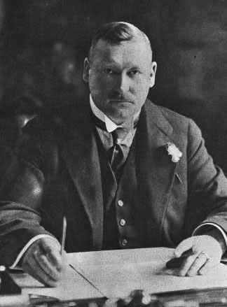 Axel Granholm (1872-1951)